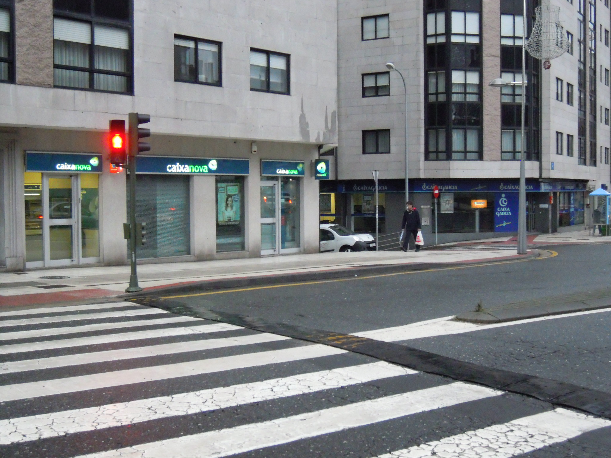 Sucursais de Caixa Galicia e Caixanova na rúa Eduardo Pondal de Pontevedra.